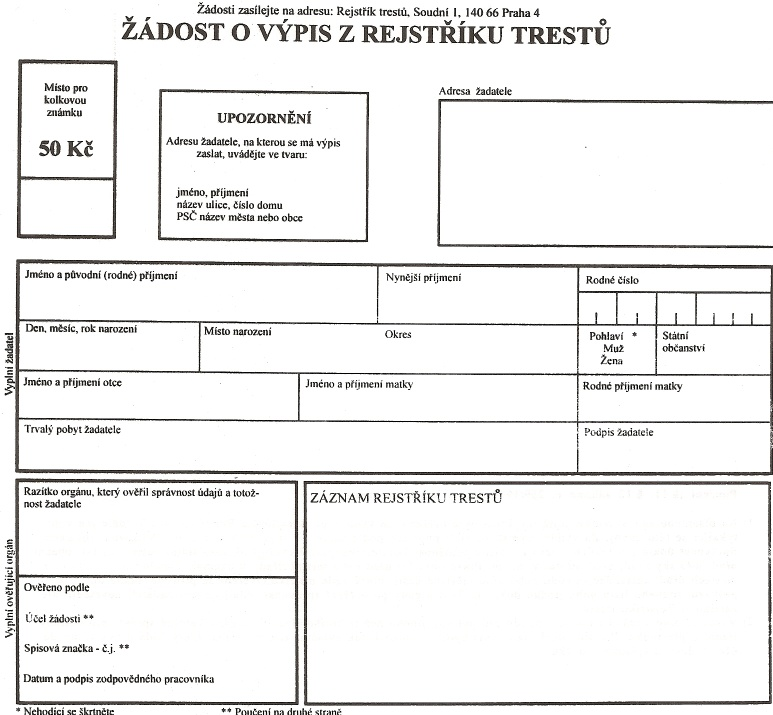 Úřední typizovaný formulář žádosti o výpis z Rejstříku trestů, který je k dispozici na každém okresním státním zastupitelství. Dne 12. listopadu 2006 naskenoval Radek Bartoš.